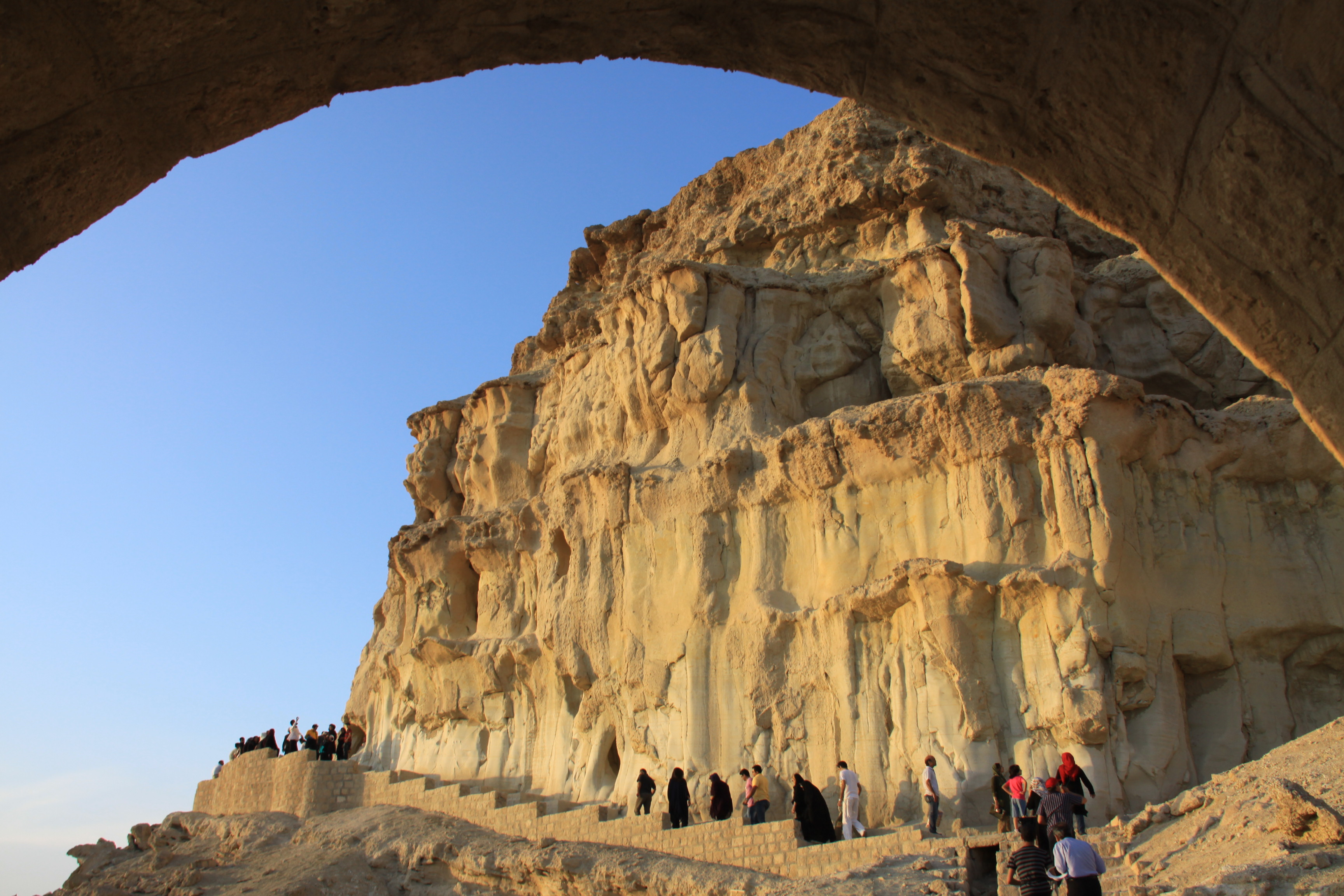 دست کند خربز یا خربس